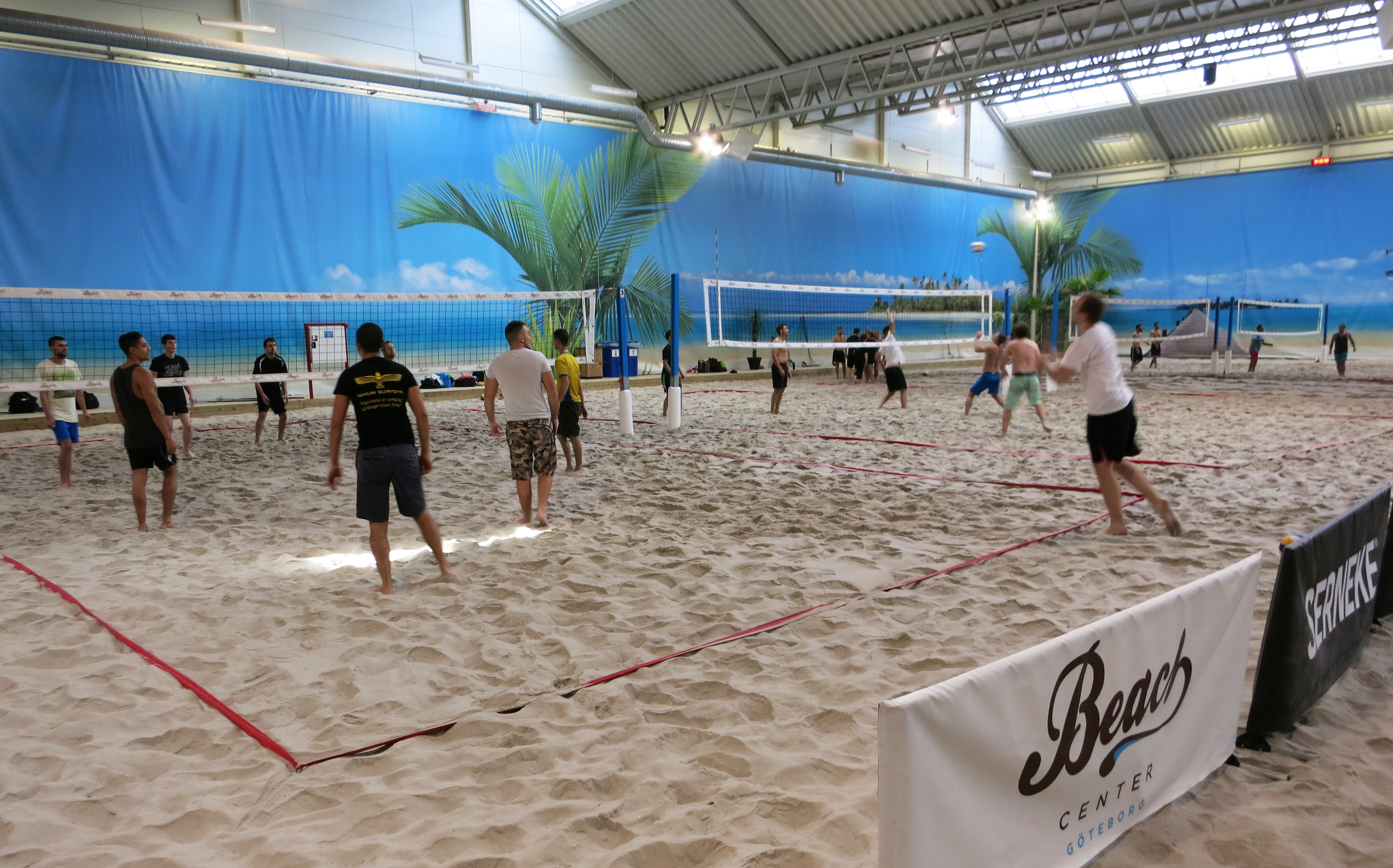 Beach Center, Göteborg, Sweden